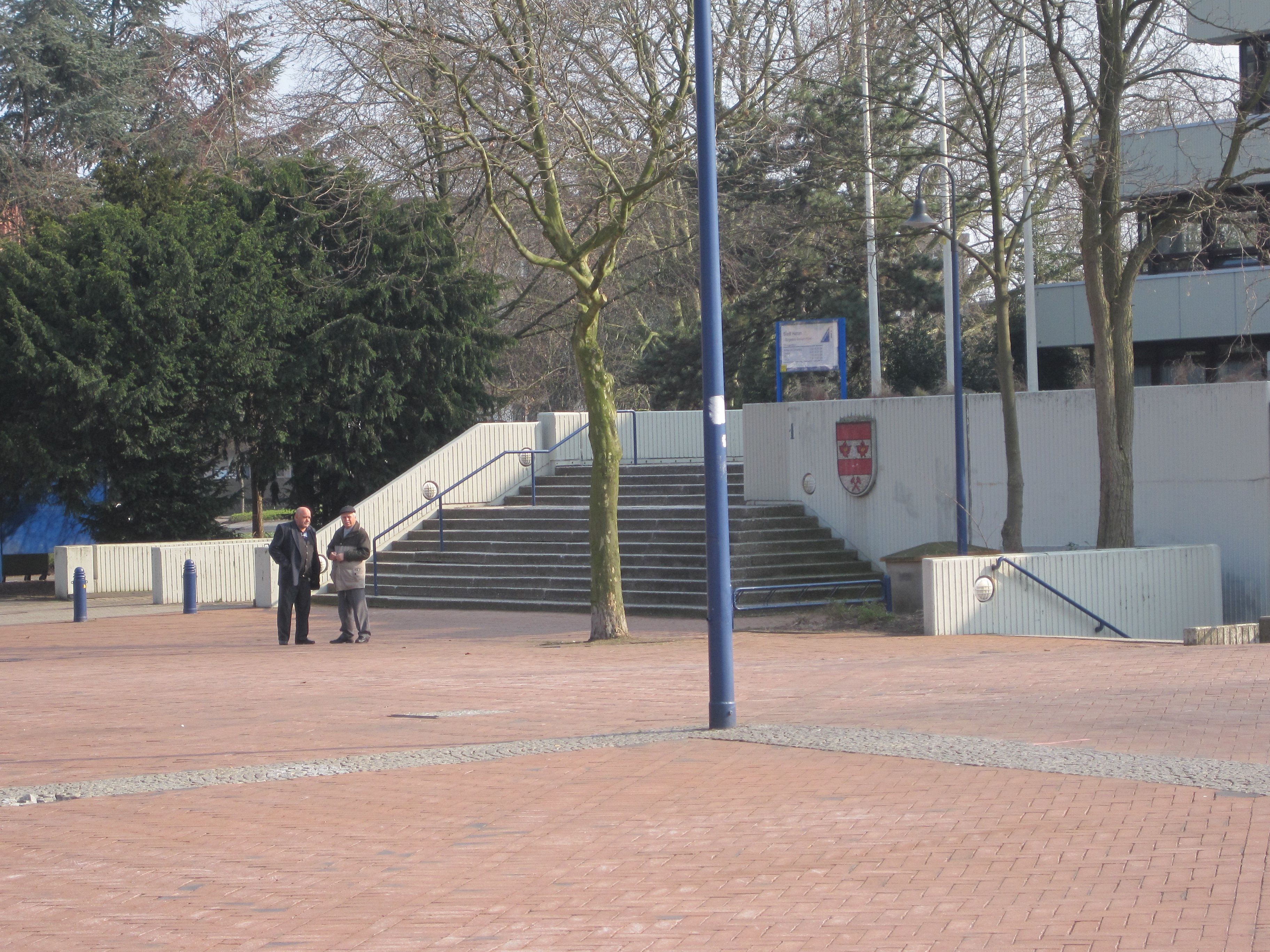 Das Foto zeigt den Treppenaufgang des Rathauses Bockum-Hövel am Marktplatz.